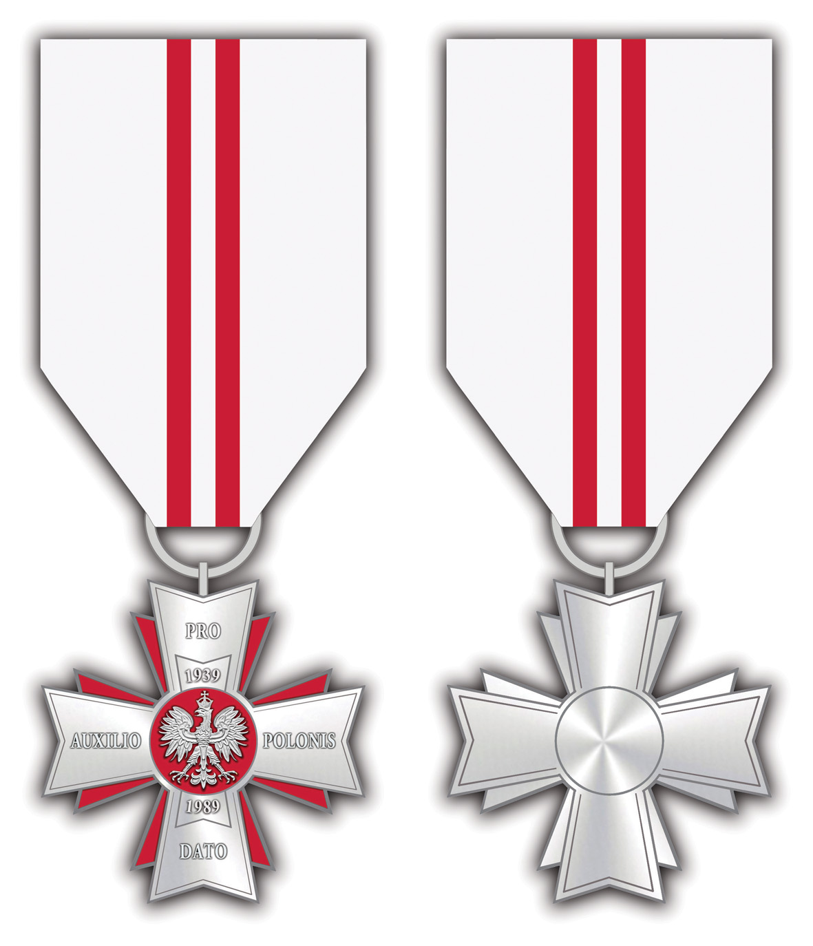 Krzyż Zachodni – projekt